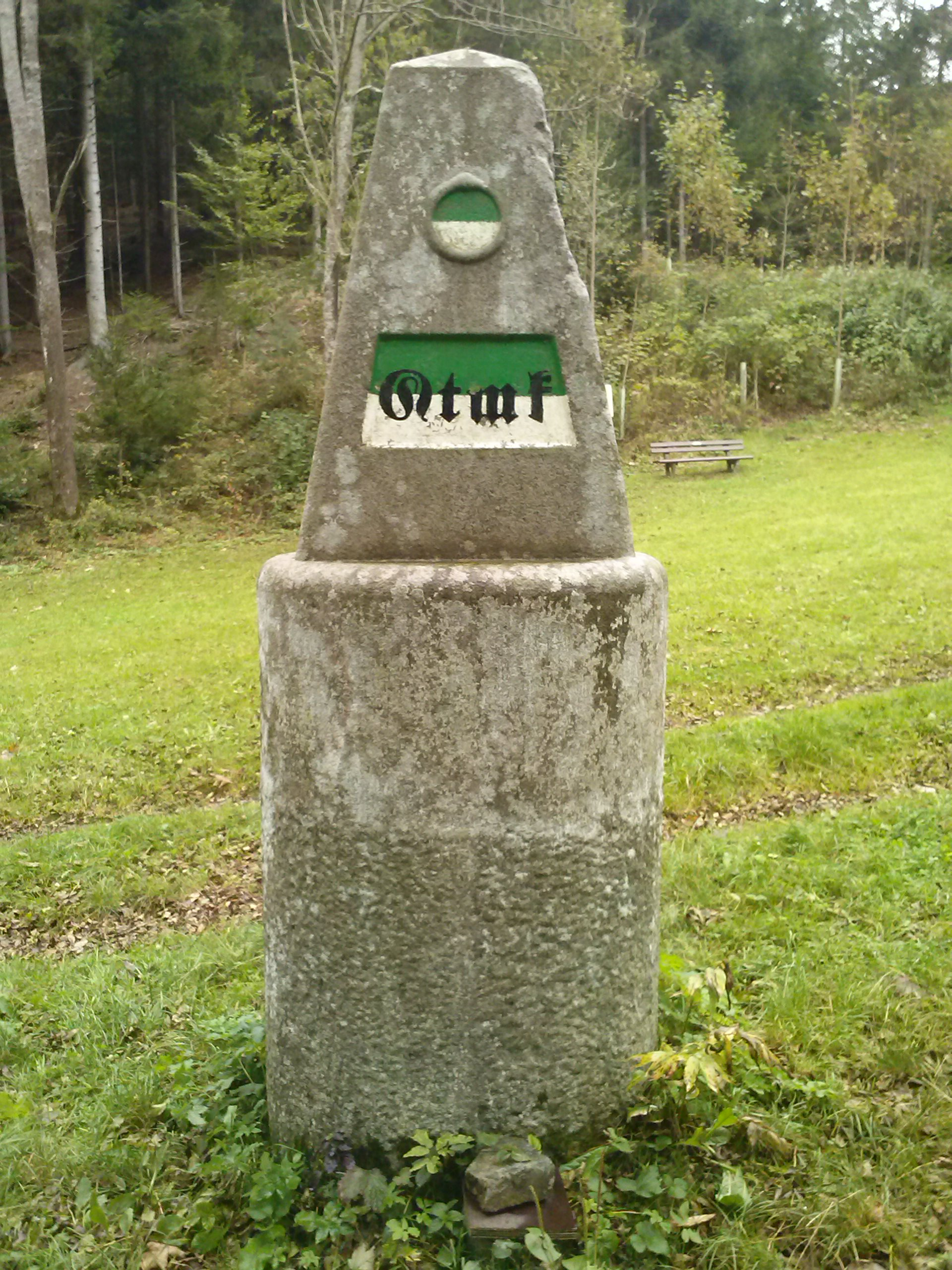 Dreiländerecke Burgenland, Steiermark und Niederösterreich: Grenzstein - Seite Steiermark